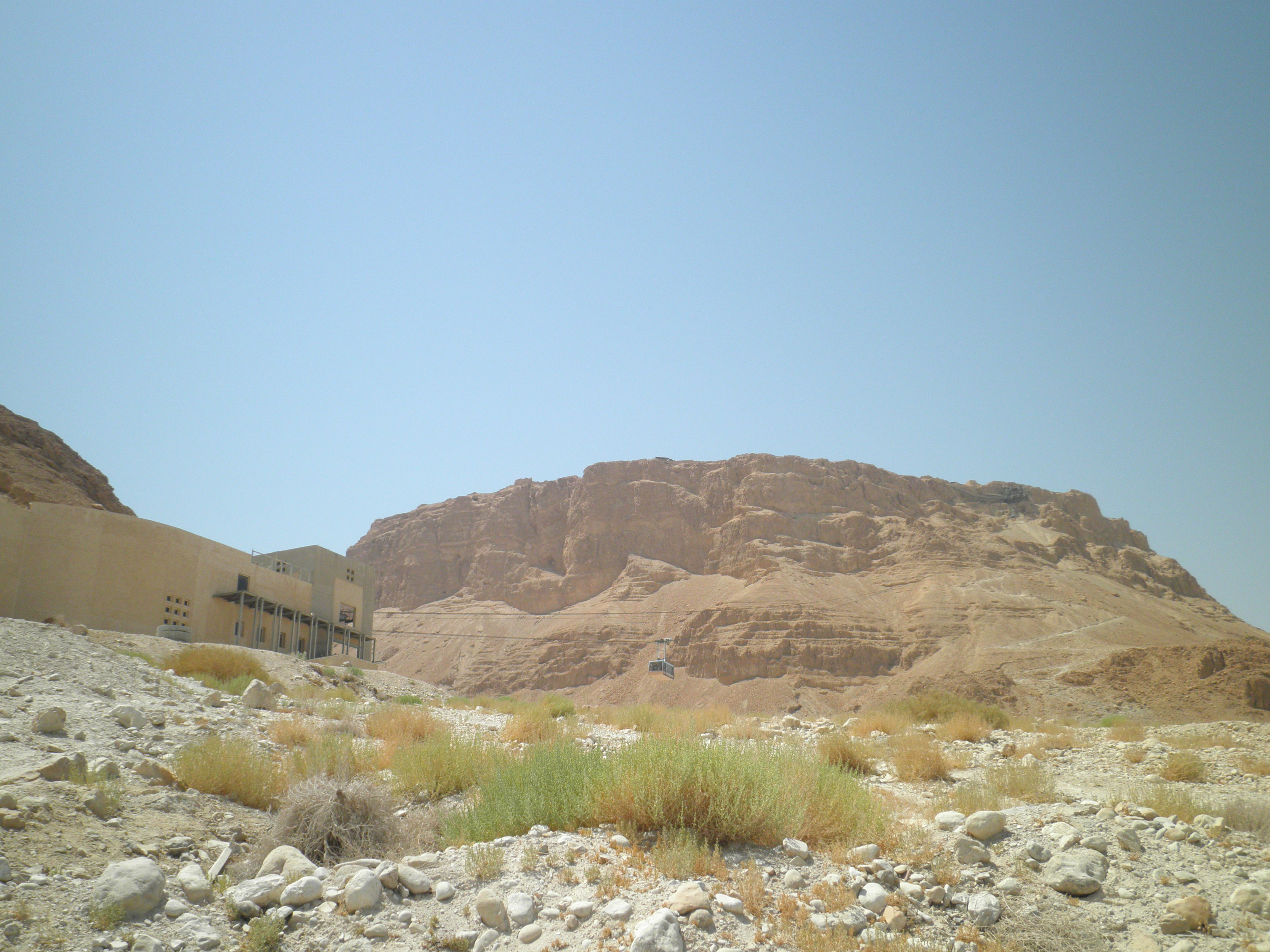 מצדה הוא מבצר עתיק על פסגתו של צוק מבודד, בשוליו המזרחיים של מדבר יהודה, המתנשא לגובה של 63 מטרים מעל פני הים, וכ-450 מטרים מעל ים המלח שלמרגלותיו. הצוק נבחר על ידי המלך הורדוס לשמש כמקום מפלט ומצודה מלכותית ועל פסגתו השטוחה נבנו ארמונות מפוארים, מבני ציבור ותענוגות. ביצורים הקיפו את המצוק ומערכות לאיסוף ואגירת מים הבטיחו אספקה שוטפת לכל אורך השנה. %